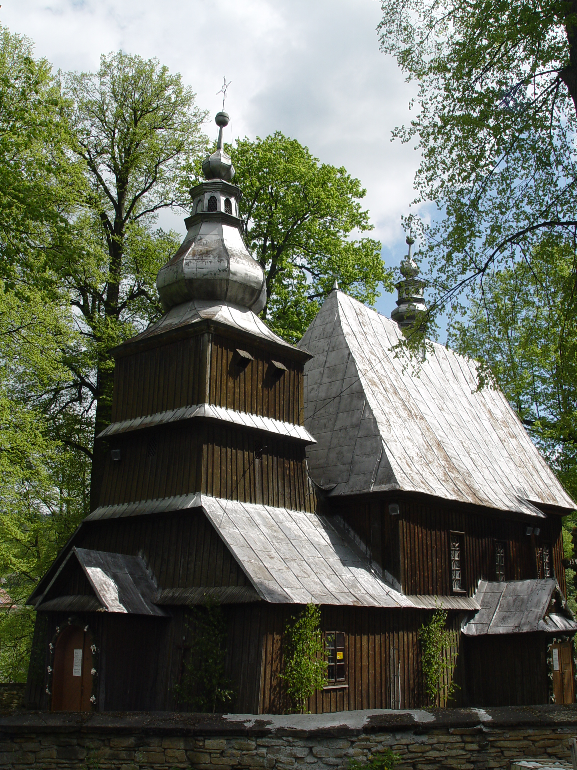 Przydonica - kościół p.w. MB Różańcowej (zabytek nr A-195 z 29.04.1960)